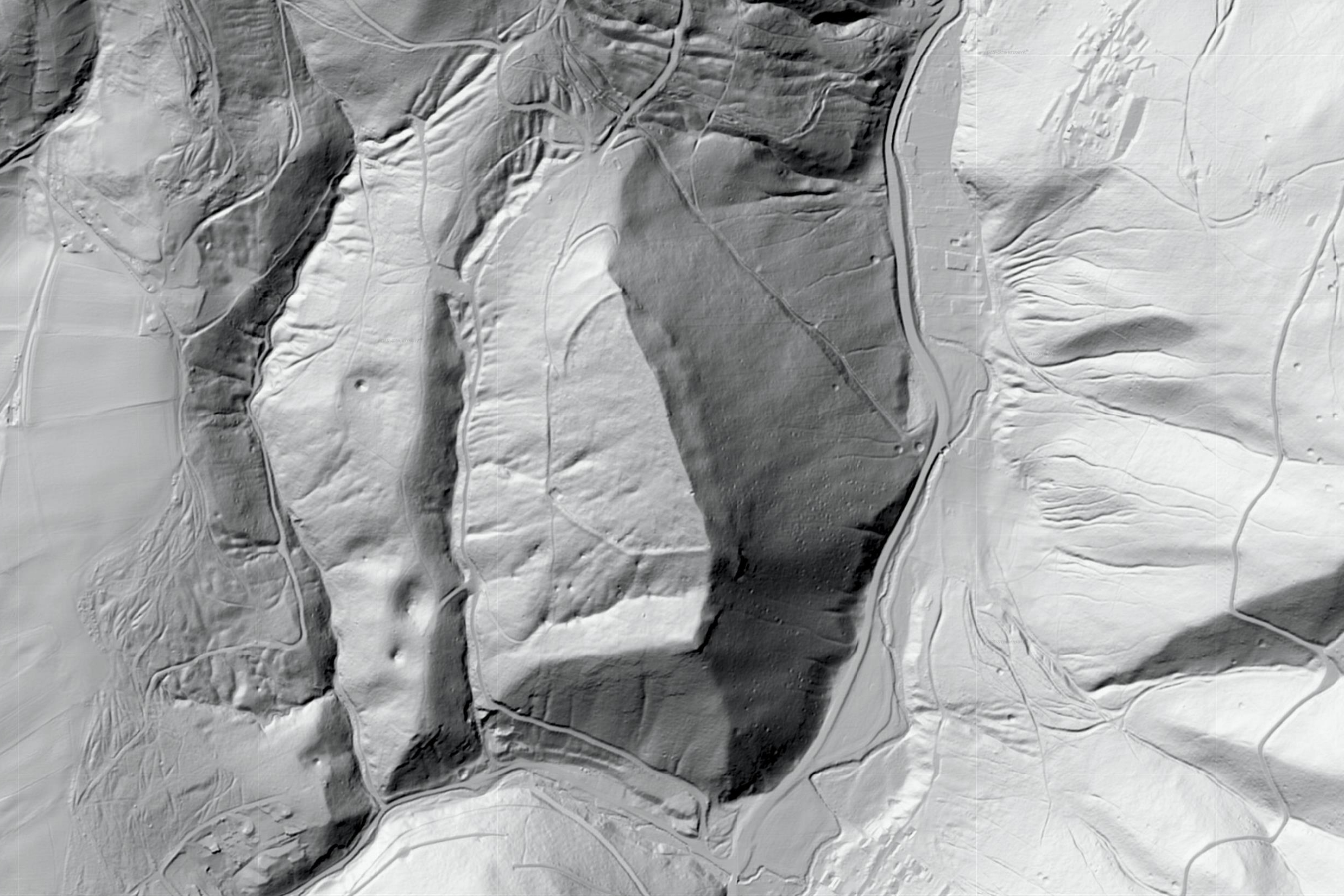 Gelände am Frauenkogel bei Gösting mit Schindelgraben (links) und Thalergraben (rechts), Graz (Steiermark)